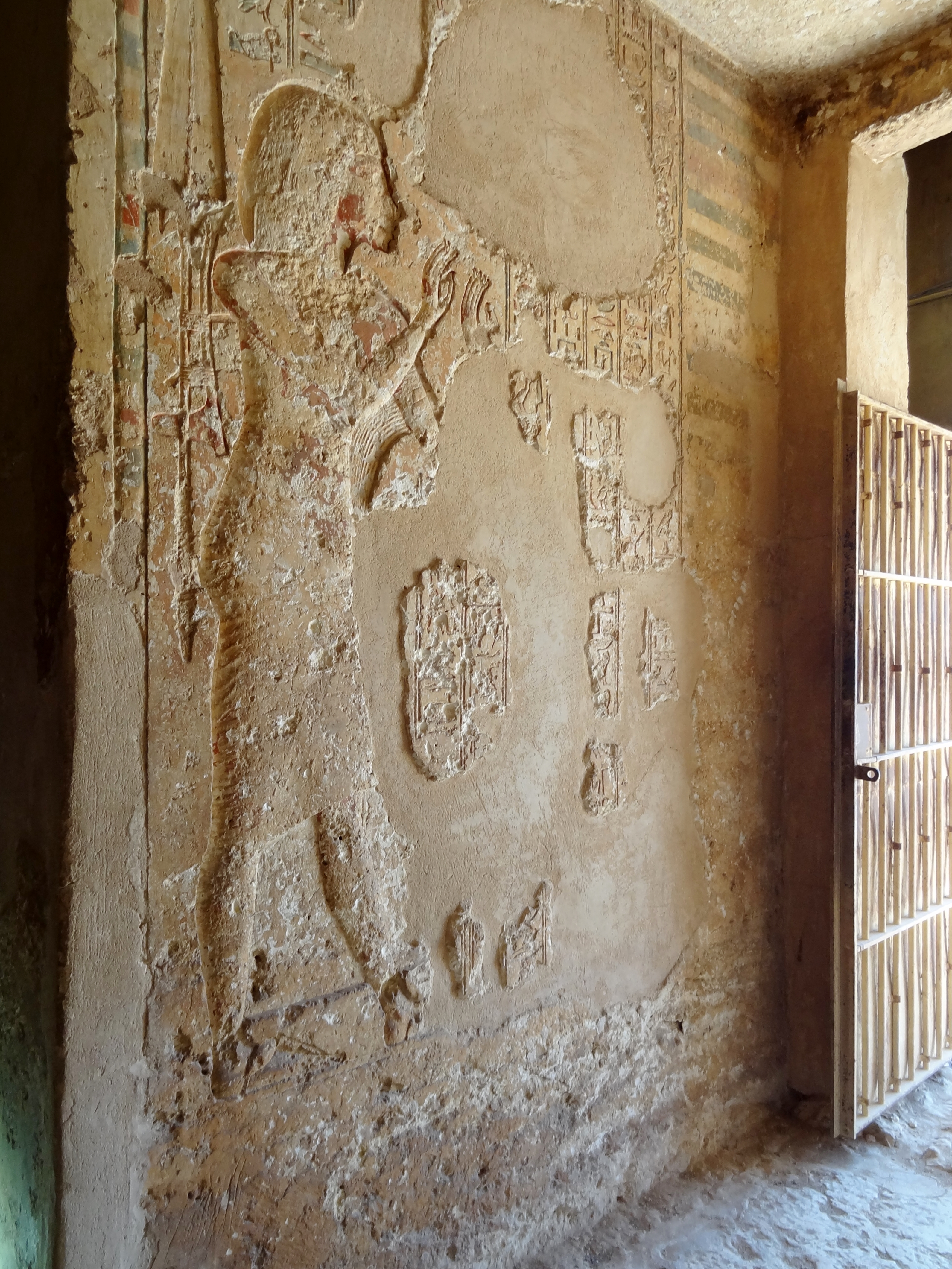 Grab des Ahmose (TA 3) in Tell el-Amarna, Ägypten